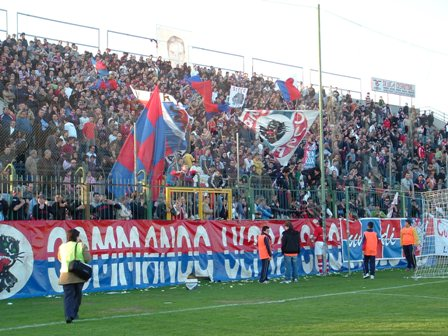 Fernando Mameli, la curva nord dello stadio casaranese